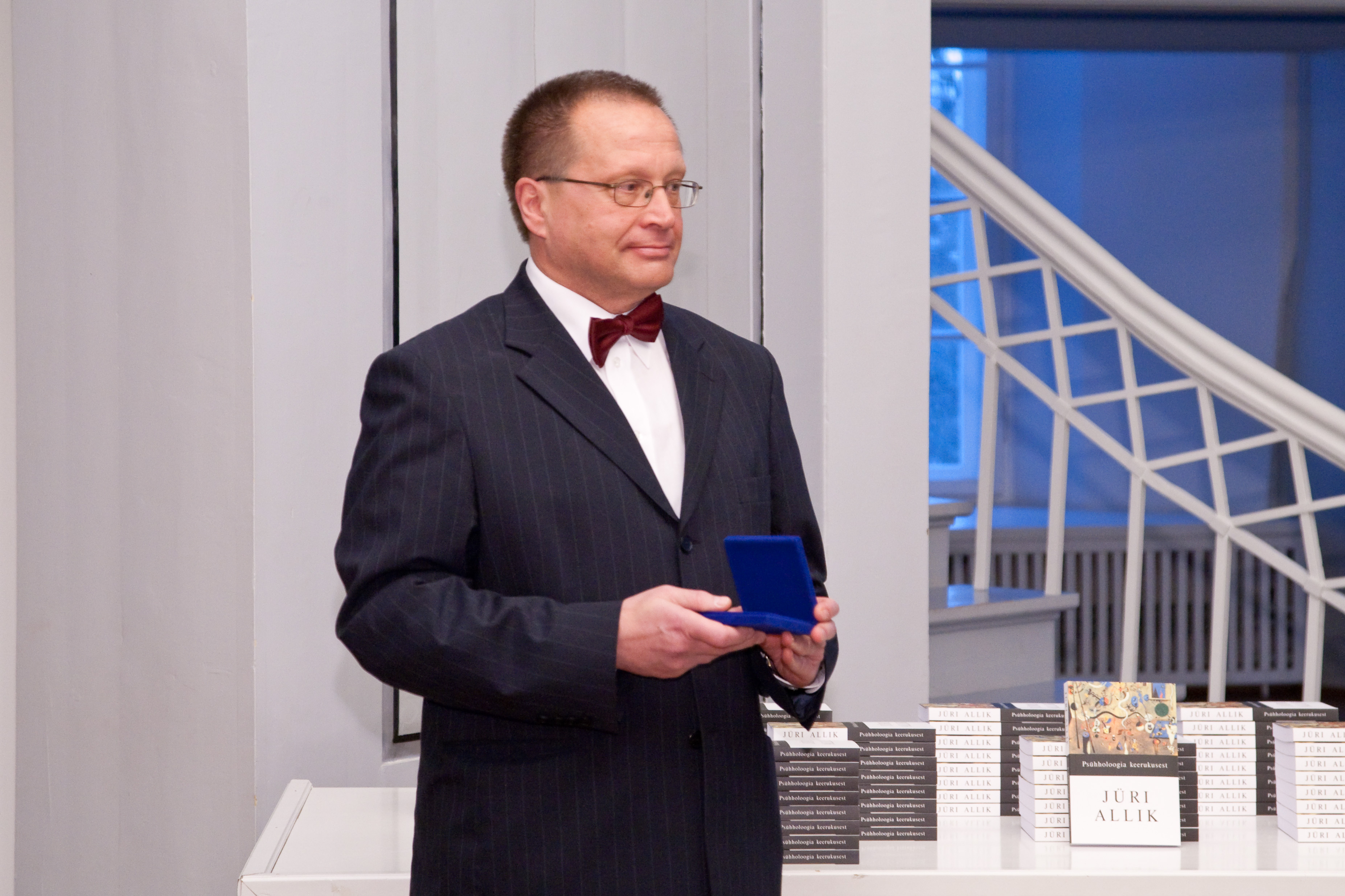 Jüri Allik